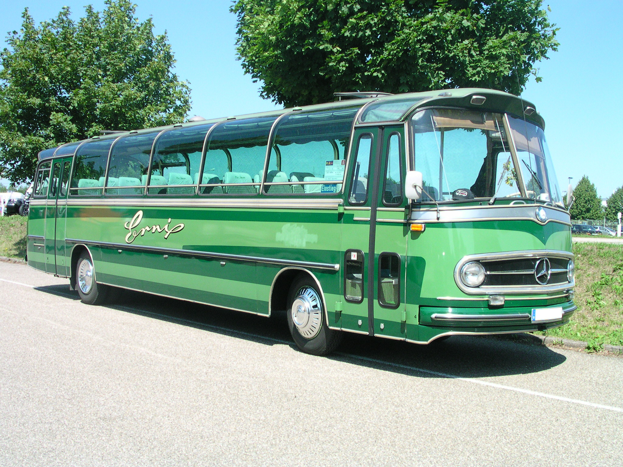 Oldtimer-Treffen bei Daimler-Chrysler in Wörth am Rhein. 1962 bei der früheren Siegener Firma Steib gebauter Mercedes-Benz O 321 HL mit längerem Radstand.